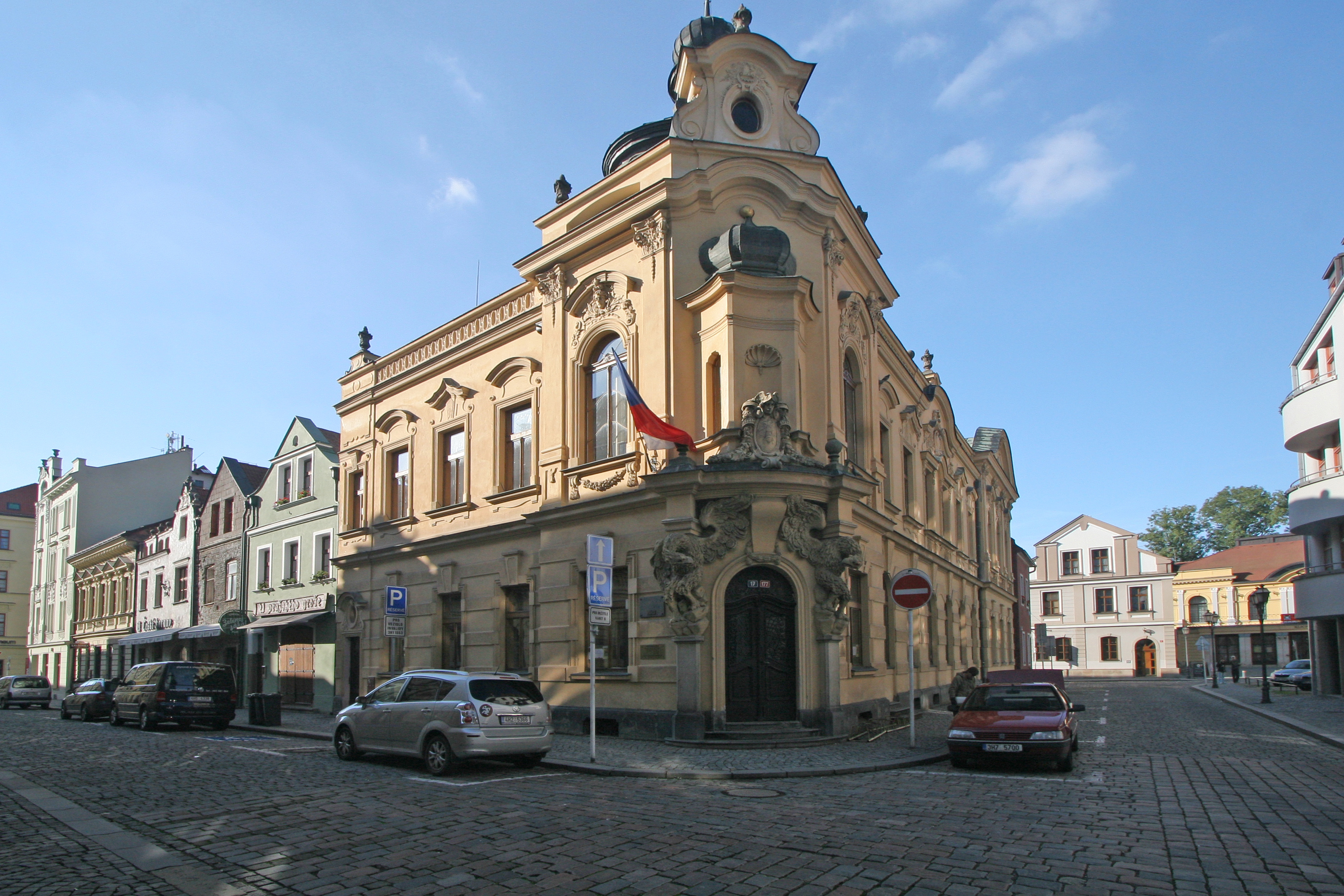 Okresní knihovna (Hradec Králové), Tomkova 177/17, Hradec Králové